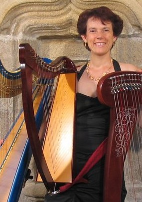 Arpista ab arpa de trobador fat ab fotografia originala de common wikimedia